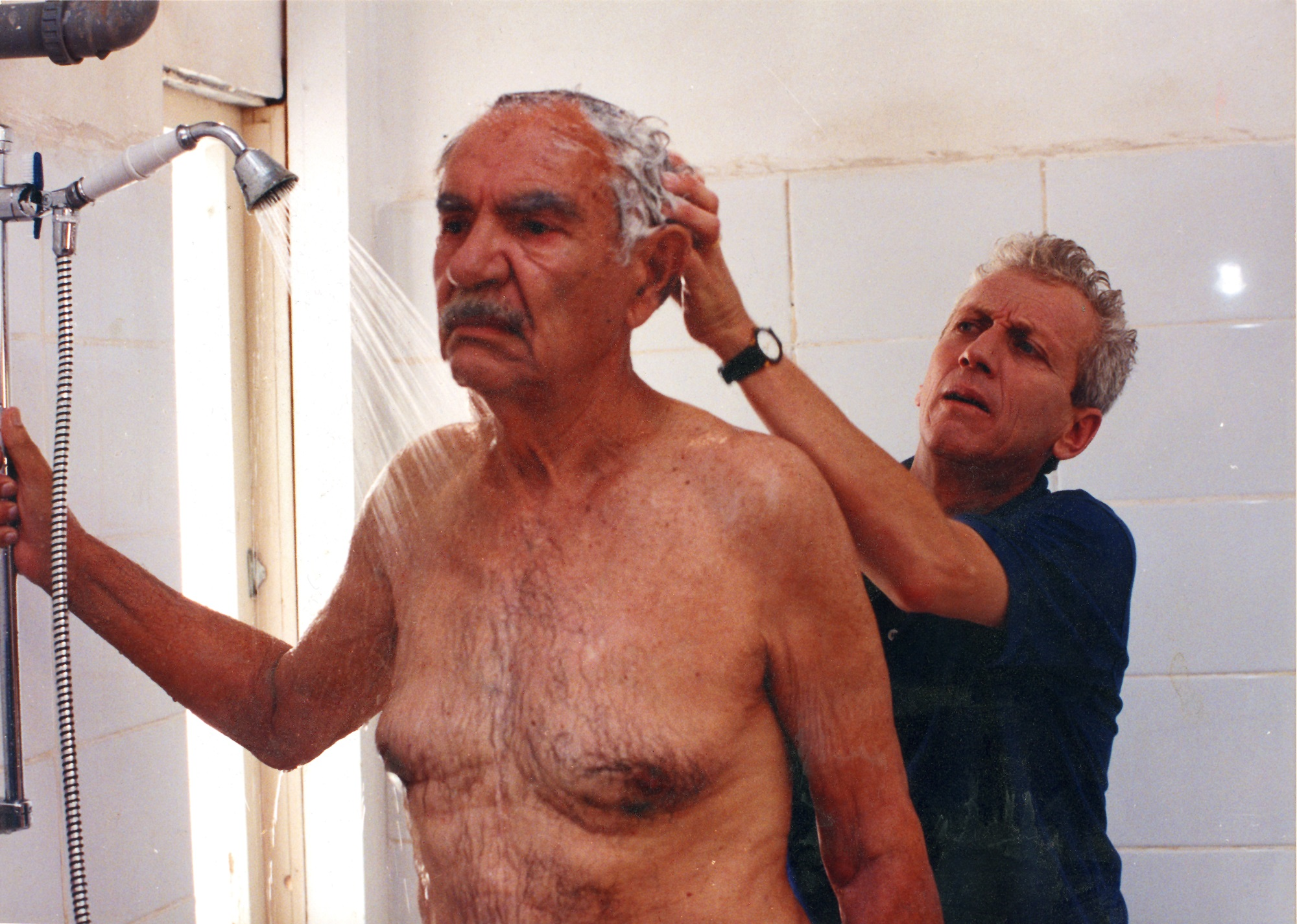 יוסי ידין ומוני מושונוב, בסרטו של חורחה גורביץ', "המקלחת", 1997